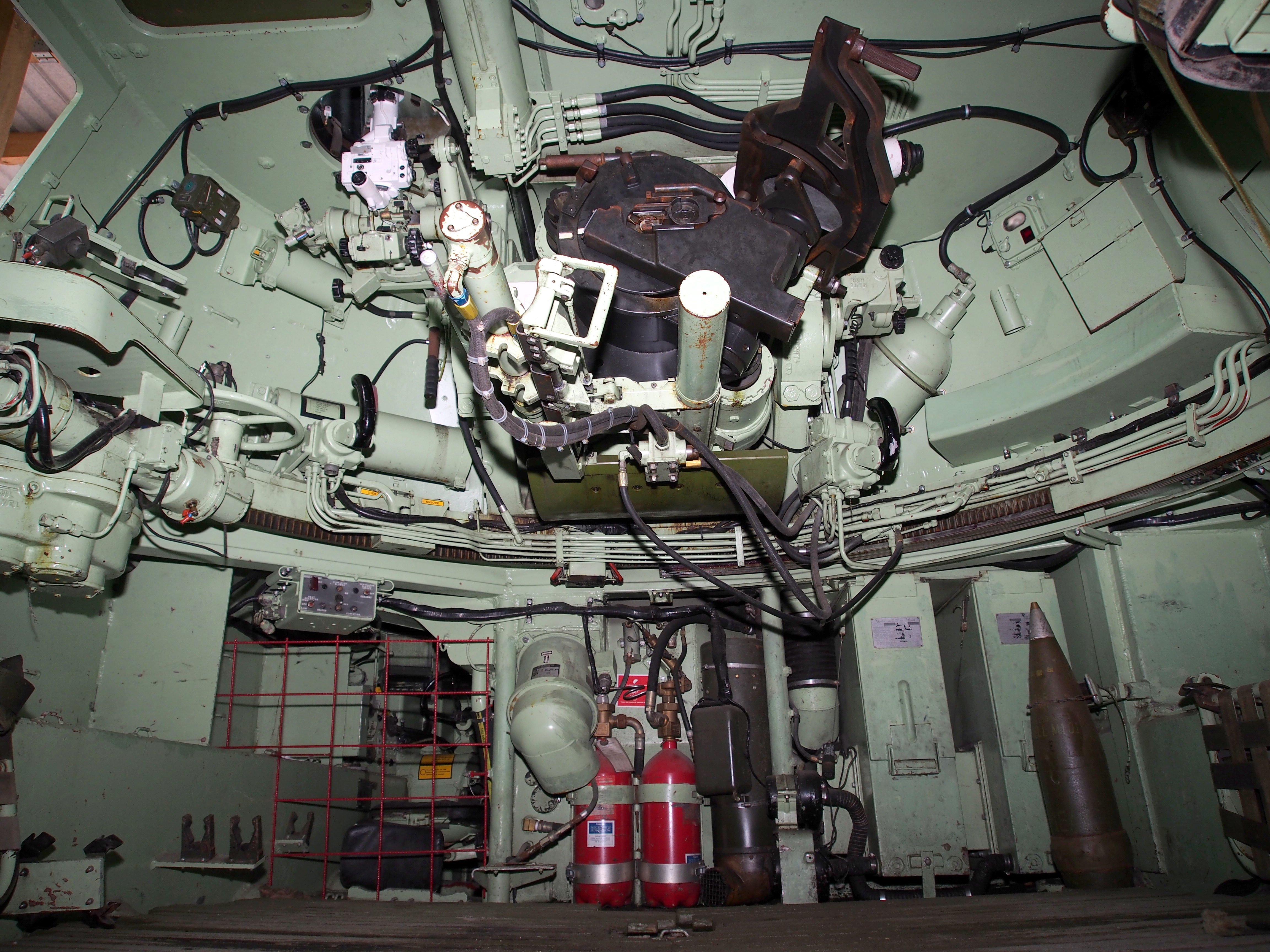 Photographed at Aalborg, Denmark.